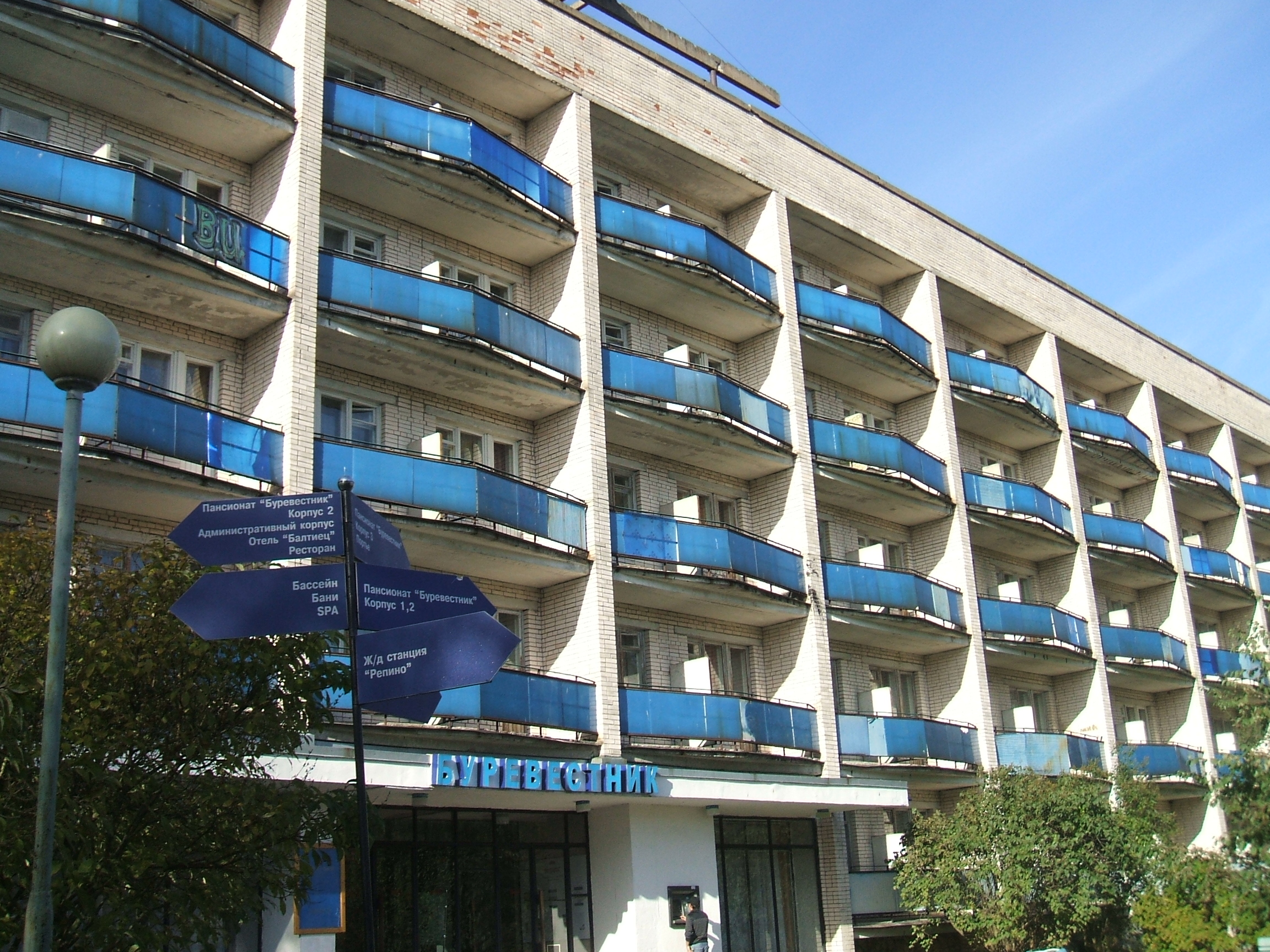 Пансионат "Буревестник" в Репино СПб. Одно из зданий.